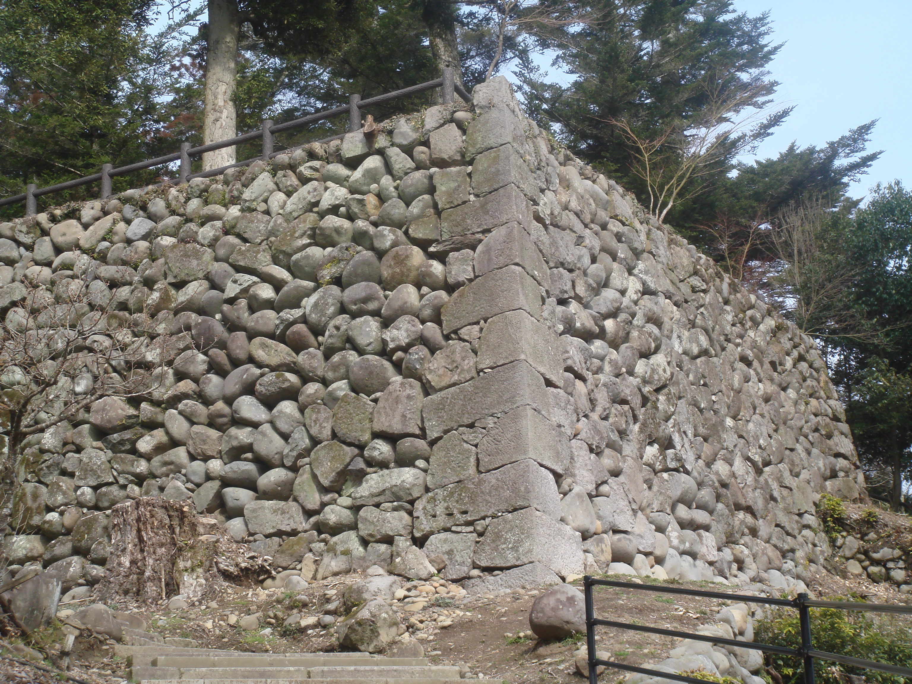 永山城本丸南西隅にある隅櫓台石垣。この北隣に本丸表虎口その北に幅7間程度の同様の石垣があったことが2011年度の発掘調査で判明している。被写体の櫓台西面の幅は天端で南北8間程度ある。